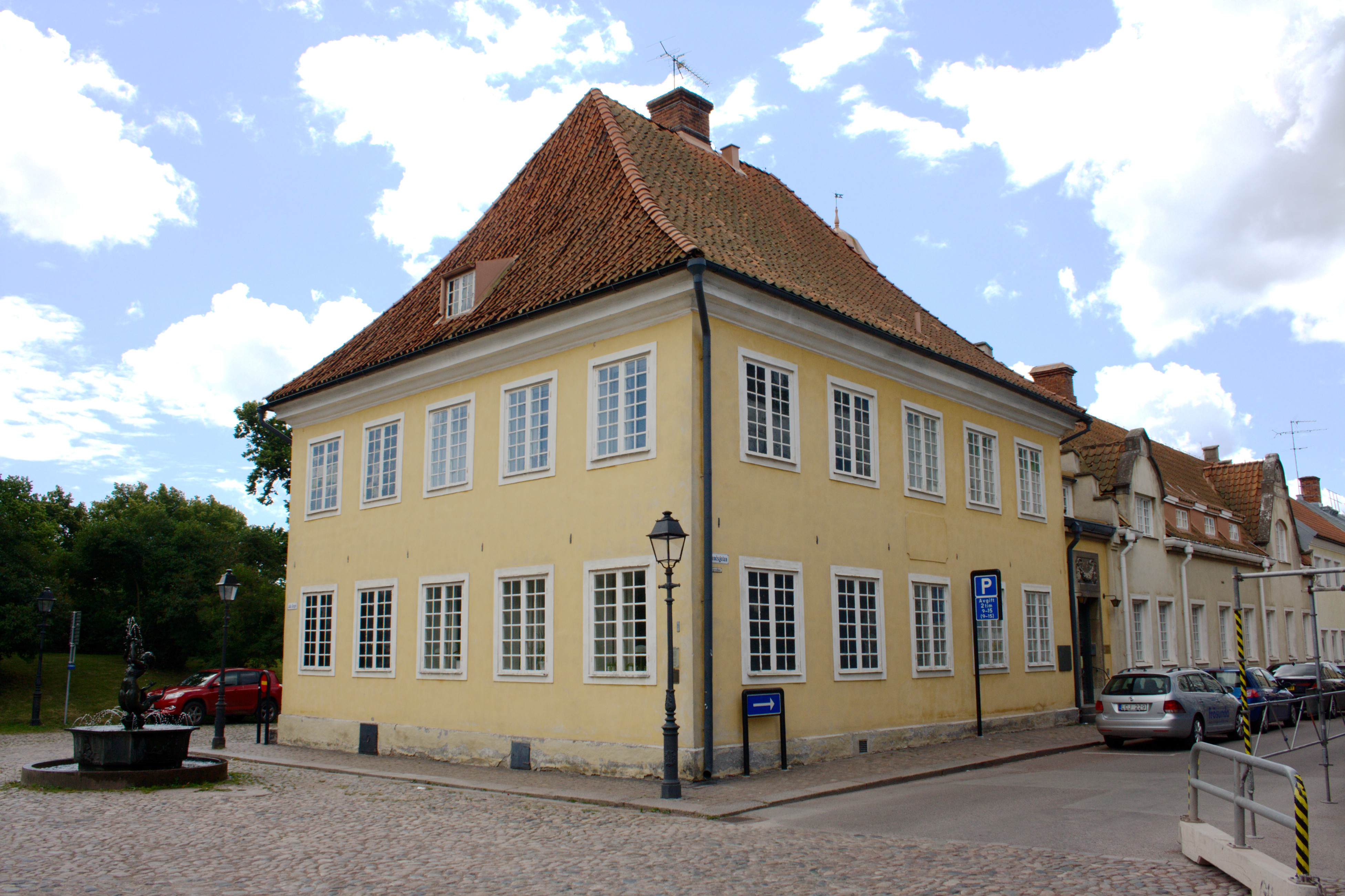 Domprostgården i Kalmar vid Lilla Torget. Gården uppfördes mellan 1656 och 1667. Byggherre var stadspresidenten Christoffer Larsson Grubb och Adrian Clausson sannolikt byggets murmästare.